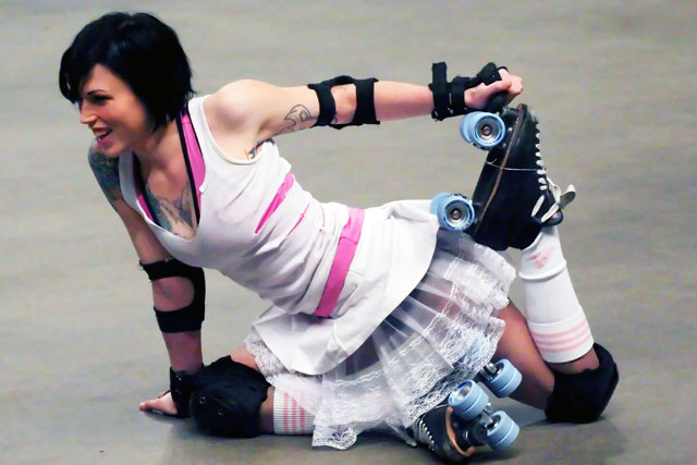 The Denver RollerDolls – Yuletide Beatings: Nutkrackers vs Jinglebelles @ The Denver Coliseum